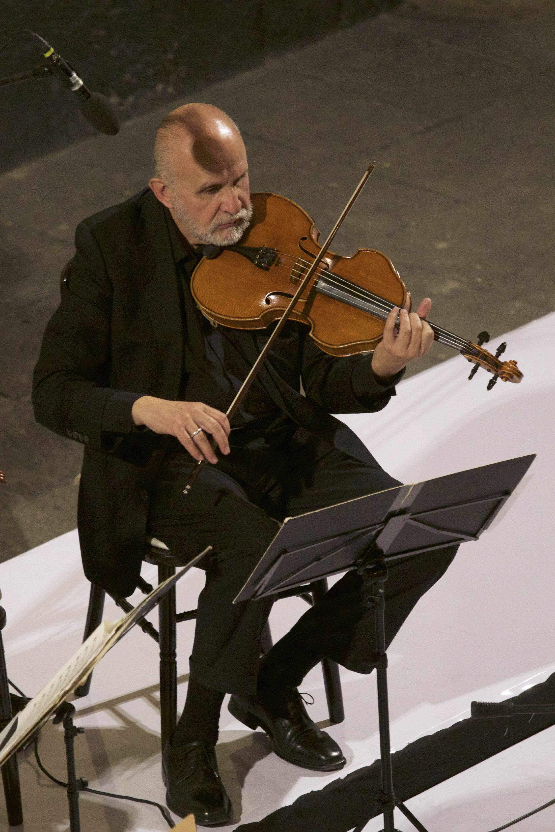 Martes 28 de noviembre de 2017 En Museo de la Ciudad de México la cantante Jaramar acompañada por el Cuarteto Latinoamericano, ofrecieron el concierto El hilo invisible, cantos sefaradíes, proyecto por el cual obtuvieron el Grammy Latino 2016. Fotografía; Milton Martínez / Secretaría de Cultura CDMX